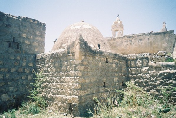 اثار لاضرحة نقباء ومشائخ الدولة الطاهرية